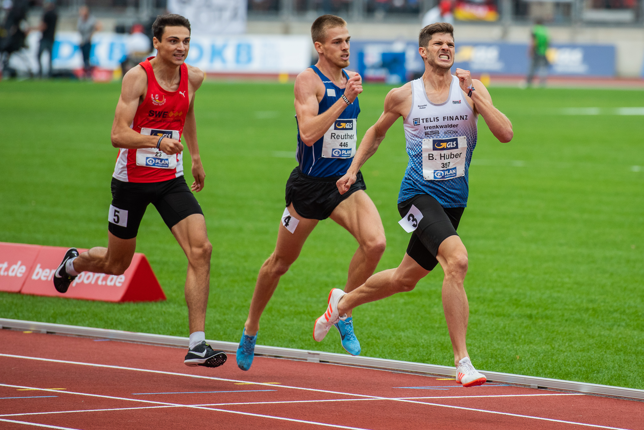 800-Meter-Lauf,Benedikt Huber,Christoph Kessler,DLV,Deutsche Leichtathletik Meisterschaften 2018,Deutscher Leichtathletik-Verband,LG Region Karlsruhe,LG Telis Finanz Regensburg,Marc Reuther,Max-Morlock-Stadion,Wiesbadener LV